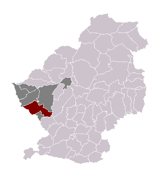 Lambres-lez-Douai dans son canton et son arrondissement